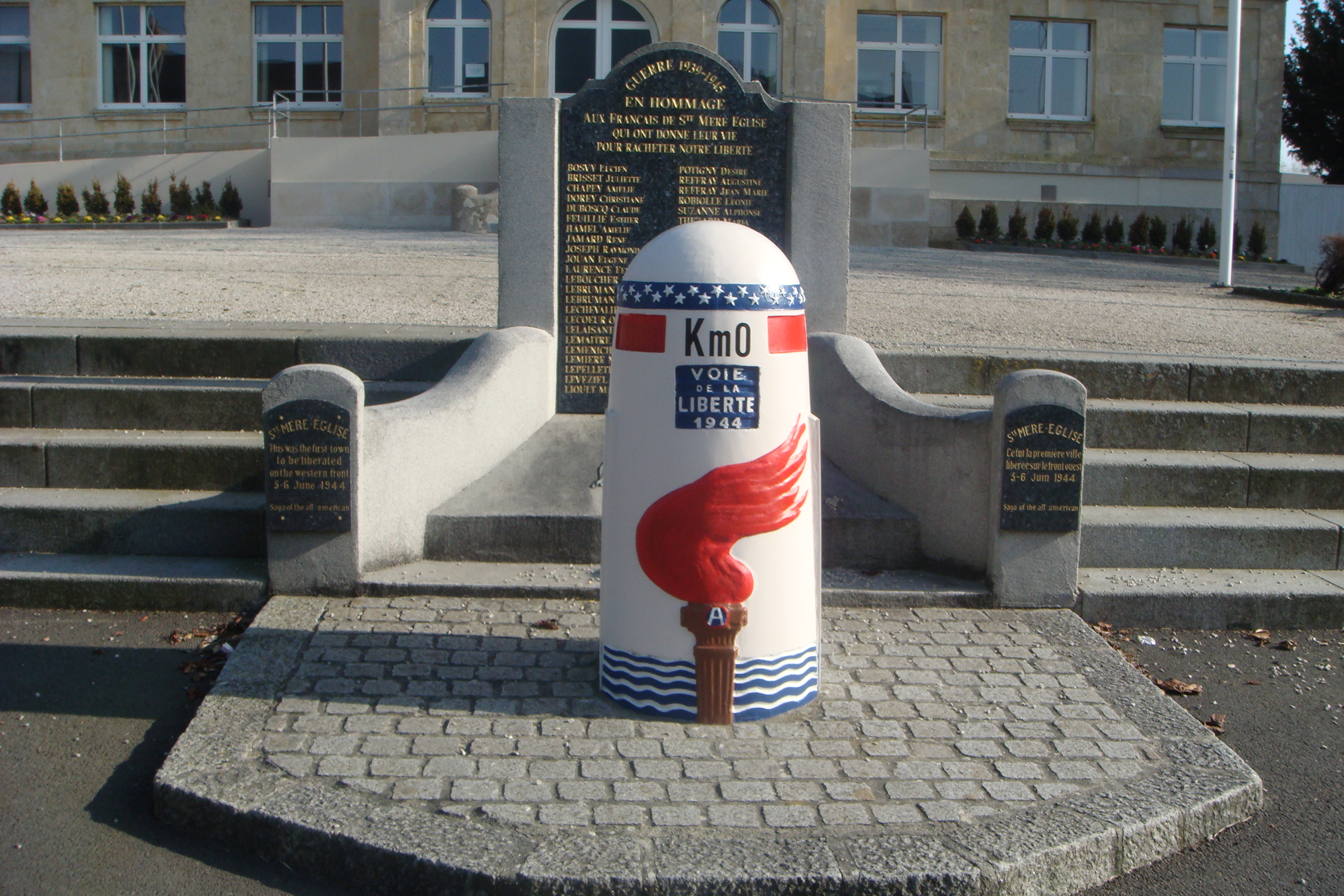 il s'agit de la borne 0, point de départ de la voie de la liberté qui se termine à Bastogne en Belgique.